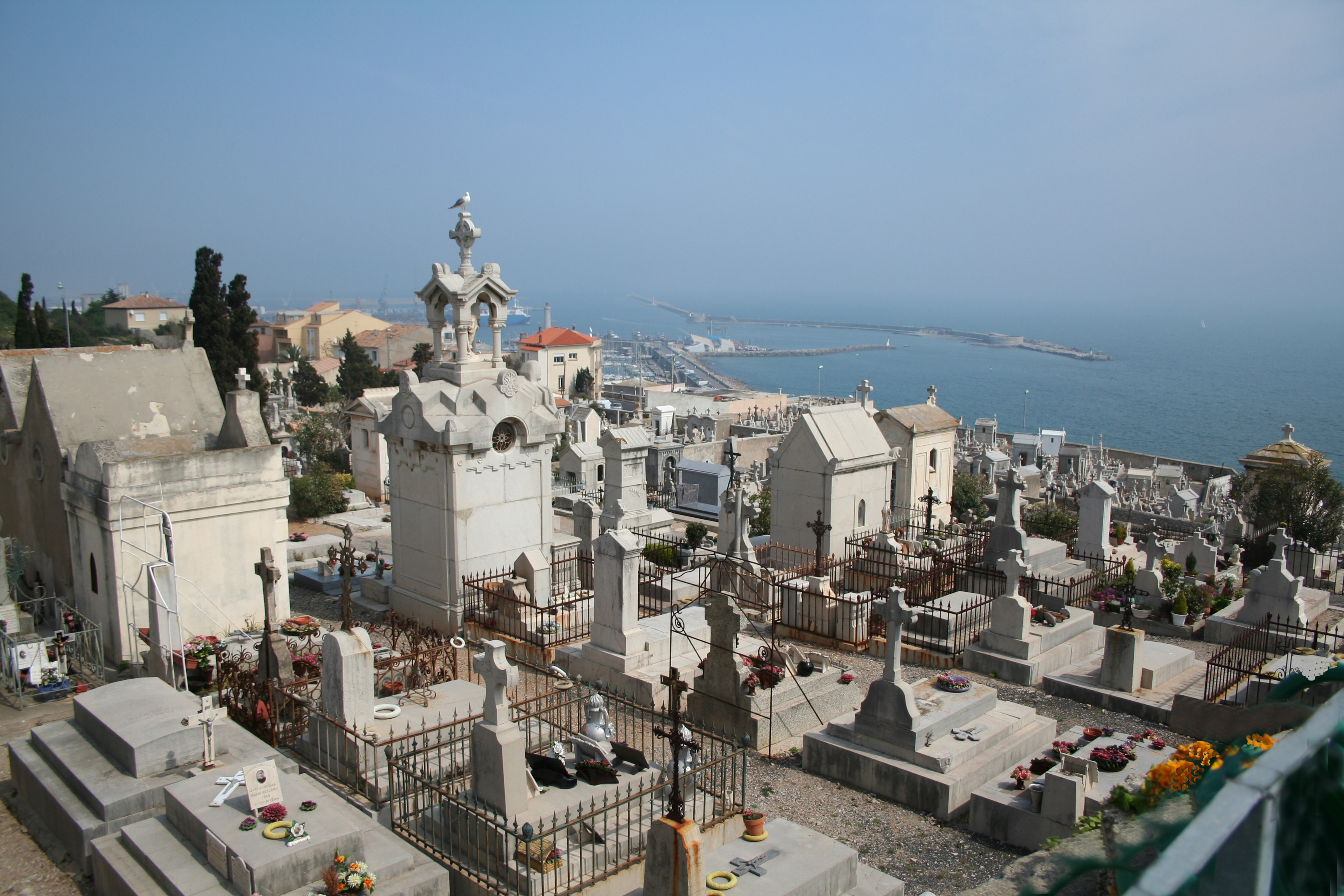 Sète (Hérault) - cimetière marin.